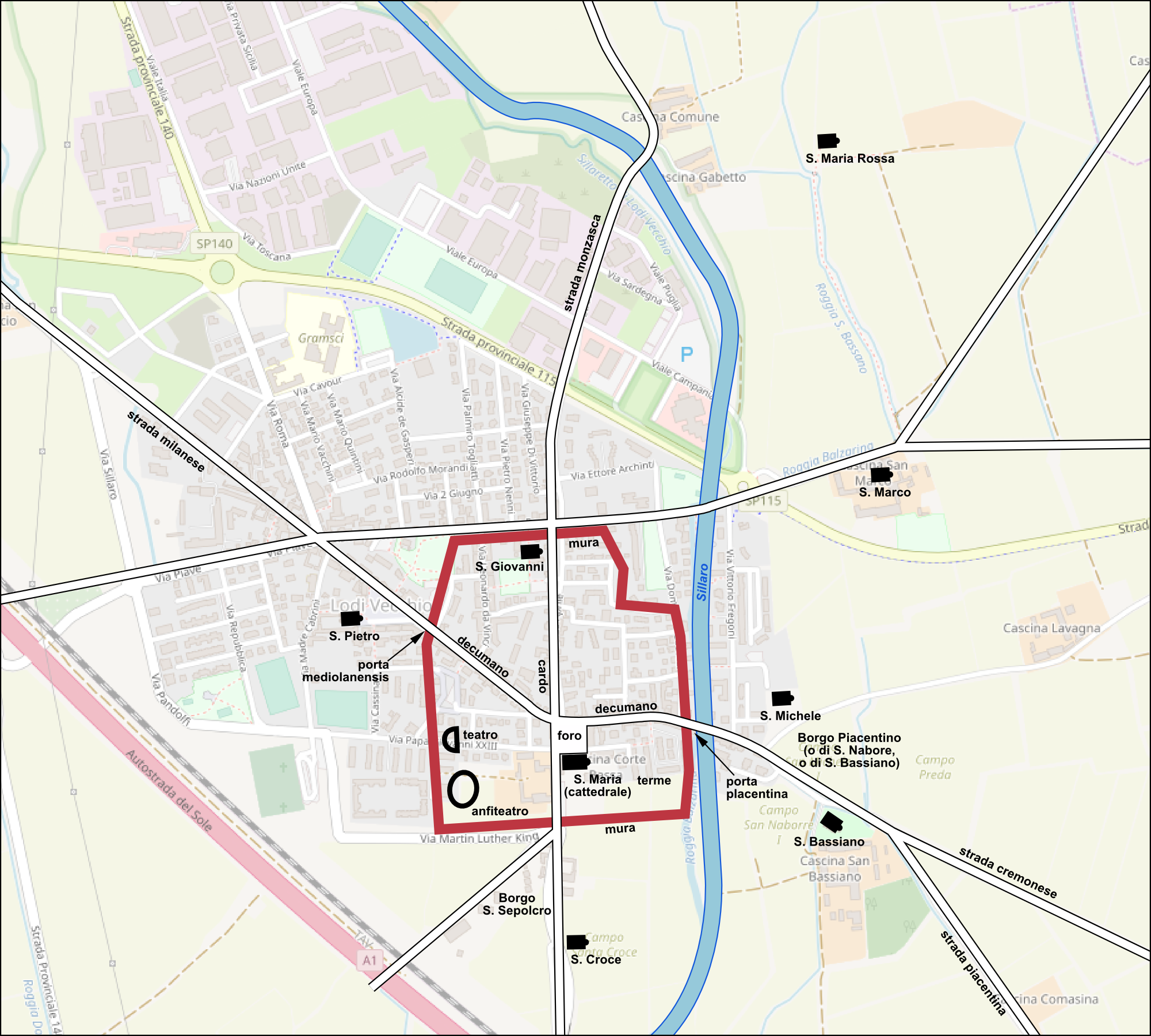 Mappa della città romana di Laus Pompeia. This map may be incomplete, and may contain errors. Don't rely solely on it for navigation.